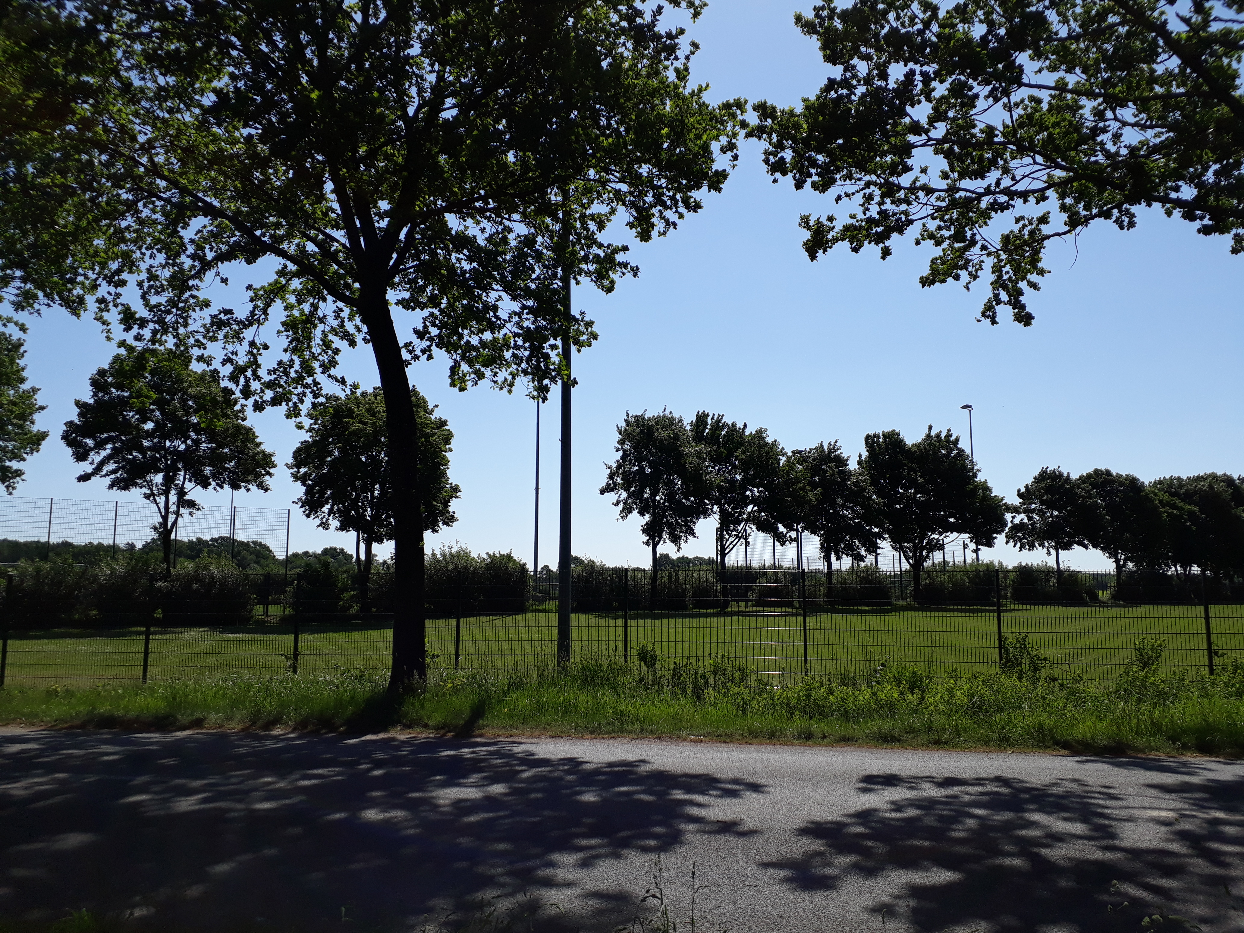 Sportanlagen des SV Ahlerstedt/Ottendorf bei Ottendorf.